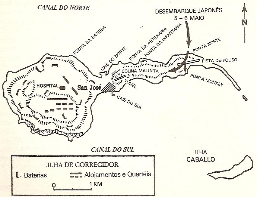 Mapa de Corregidor